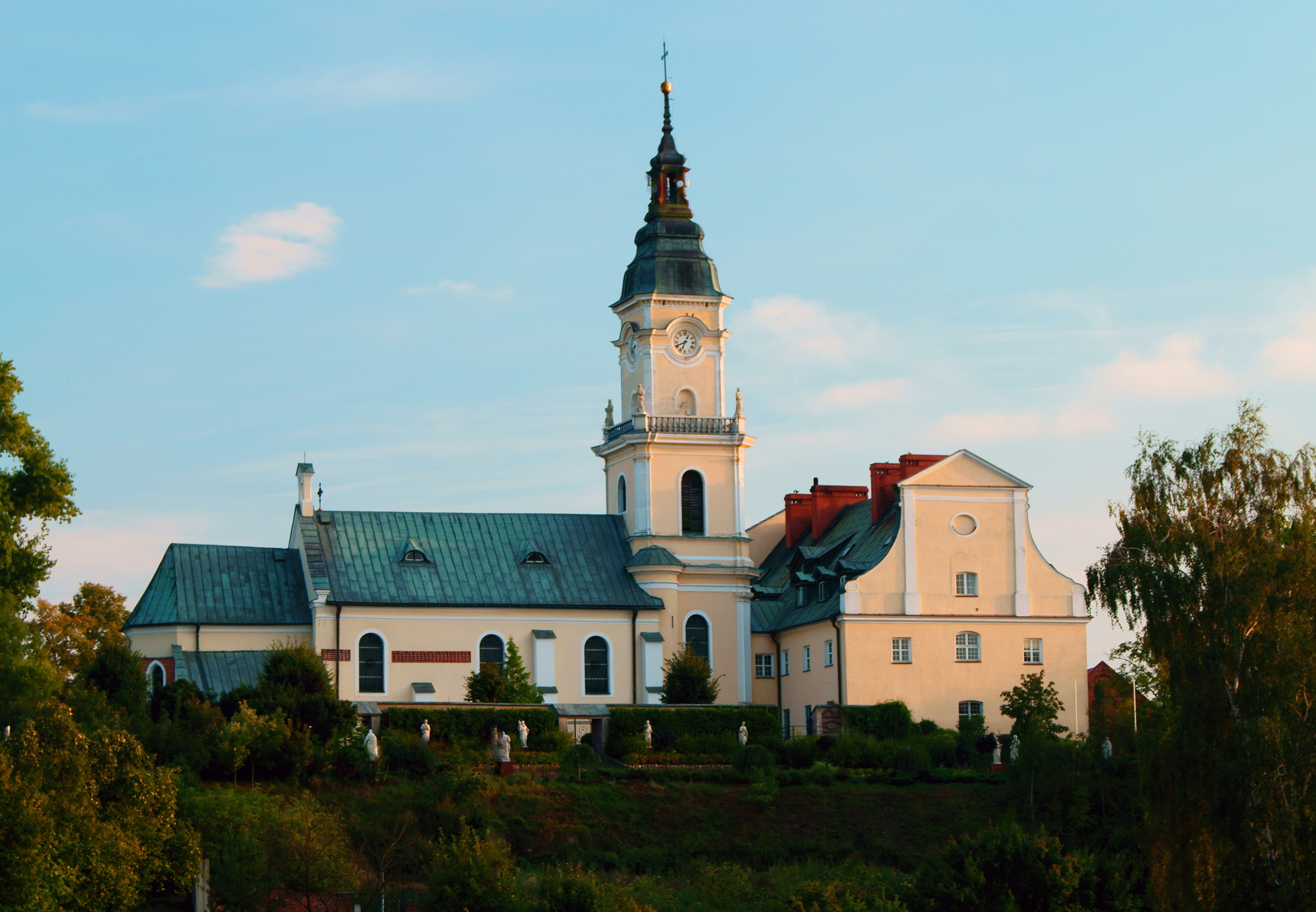 Brdów - zespół klasztorny paulinów z 2. połowy XVIII w. kościół pw. św. Wojciecha, klasztor (zabytek nr 5/239)